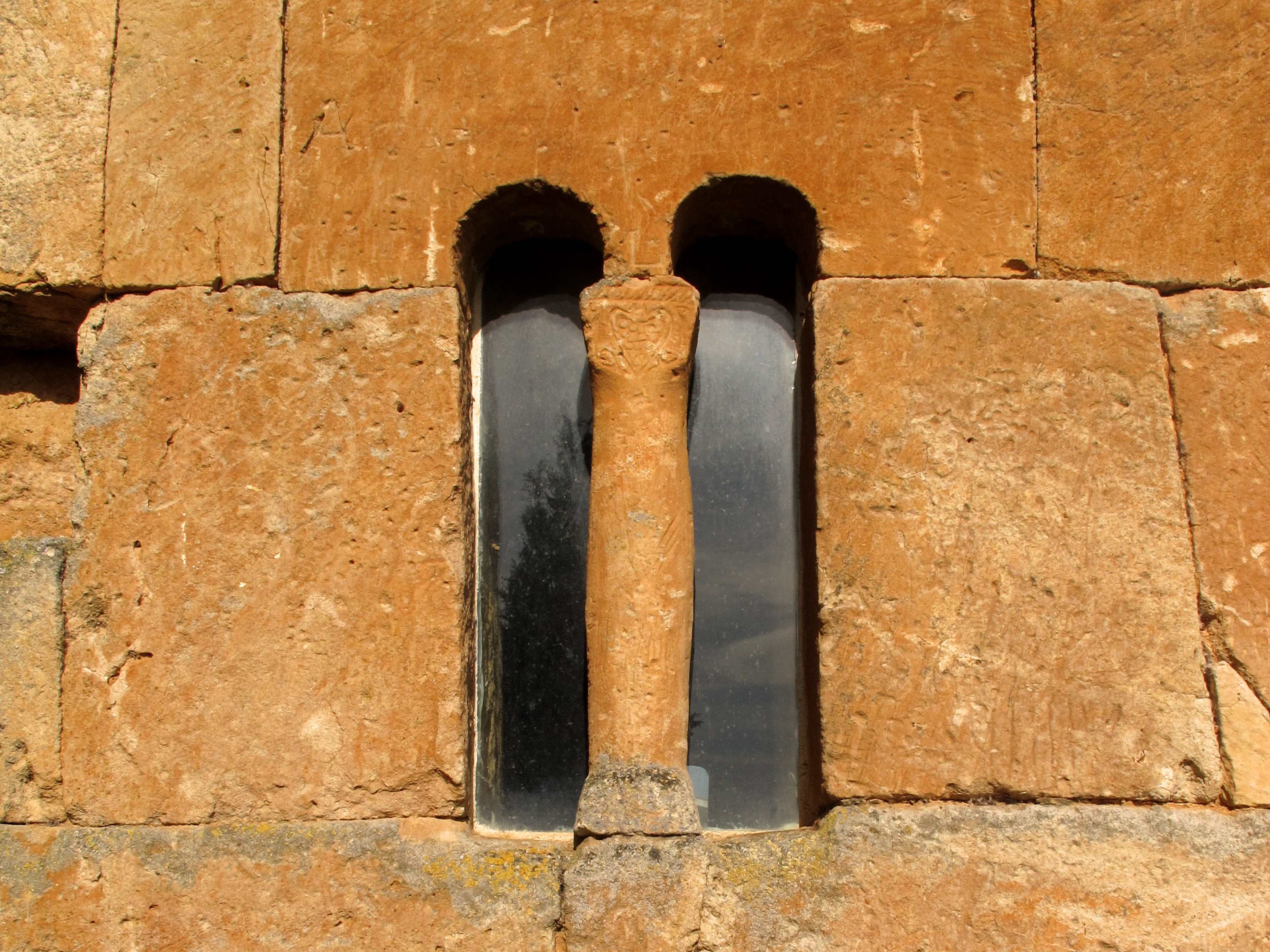 Pequeñas ventanas o saeteras, que permiten el paso de la luz La iglesia en su actual ubicación fué trasladada piedra a piedra para no quedar sumergida bajo un pantano sobre el rio Esla . quien desmonto, entre los años 1930 y 1932 numero y traslado dicha iglesia piedra a piedra fue Gabriel León Lopez , abuelo de mi marido. con esta foto quiero rendir homenaje a tantos y tantos hombres que han trabajado en cualquier lugar y jamas se les ha sido reconocido su trabajo.